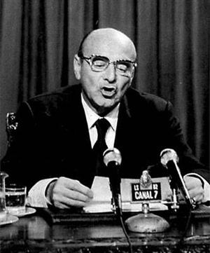 Anuncio del ministro de economía Celestino Rodrigo.